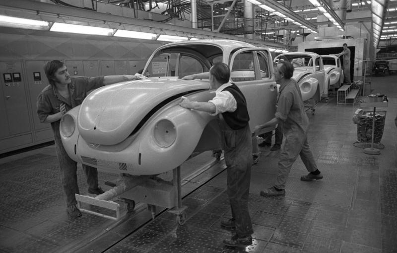 VW-Werk, Wolfsburg Lakiererei